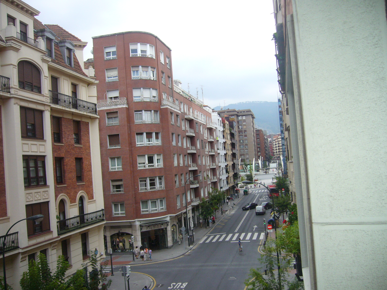 Indautxu square, Bilbao